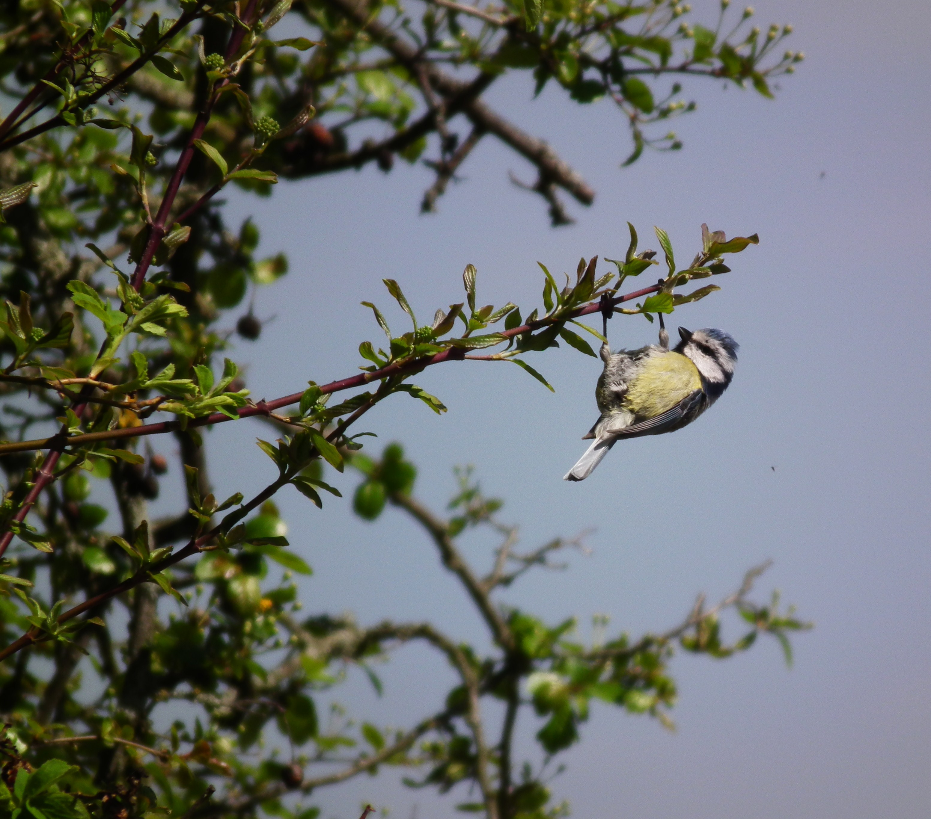 Blaumeise (Cyanistes caeruleus), fotografiert in Osthessen (Deutschland)